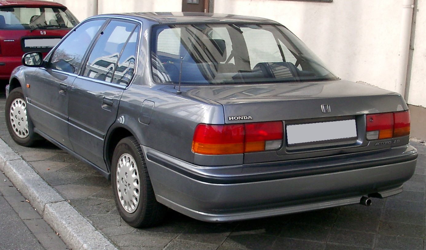 Honda Accord, 4. Generation